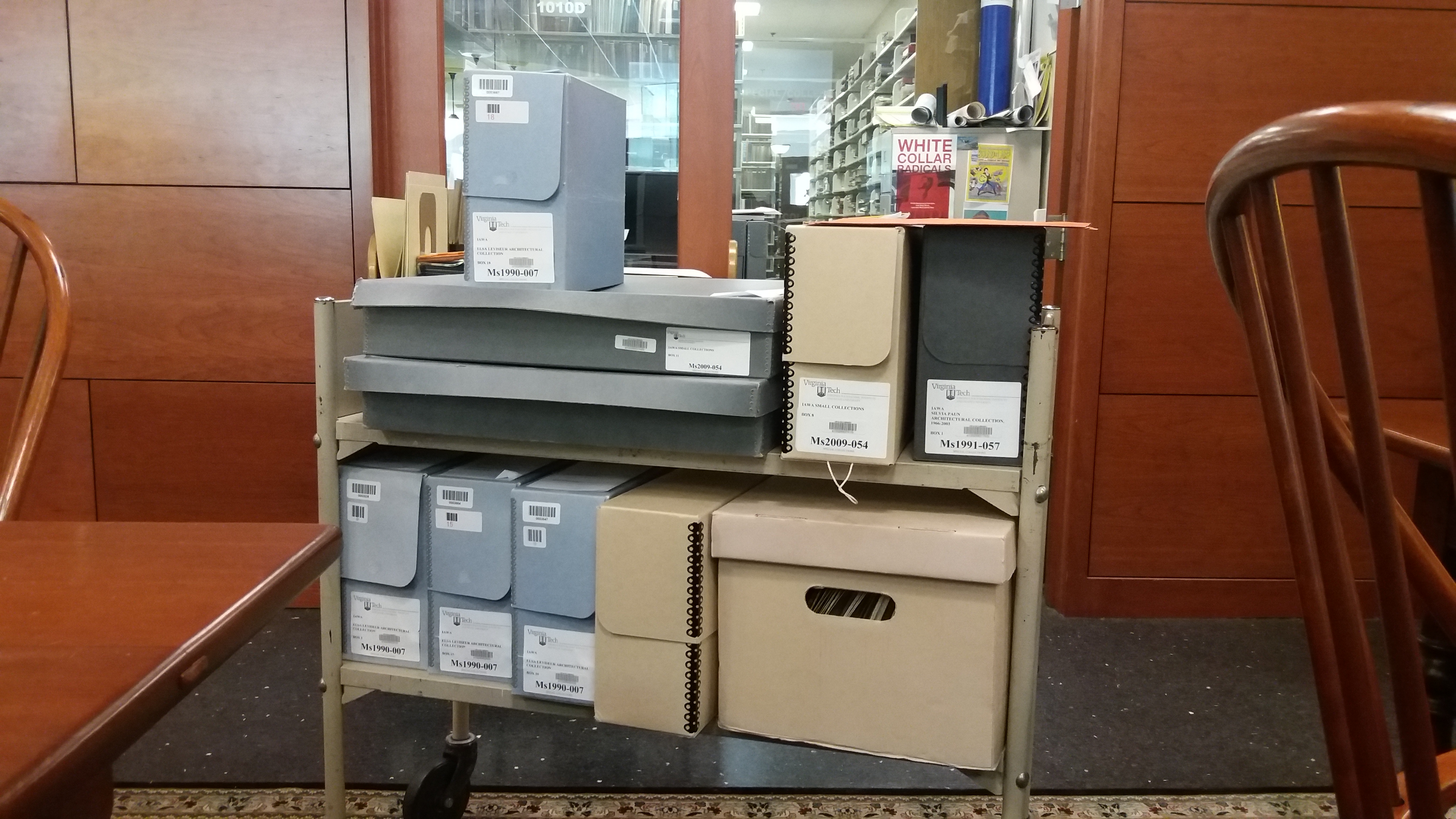 Fotos en el Archivo Internacional de Mujeres en Arquitectura IAWA, Virginia Tech, Blacksburg, Virgina, Estados Unidos, 2016.